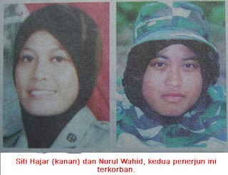 Gambar Rjr Hajar yang terkorban